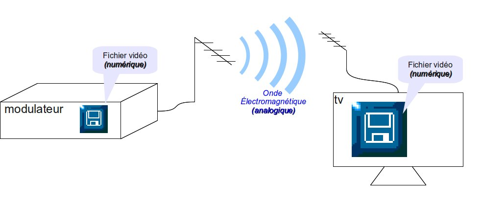 TNT : transport par onde analogique